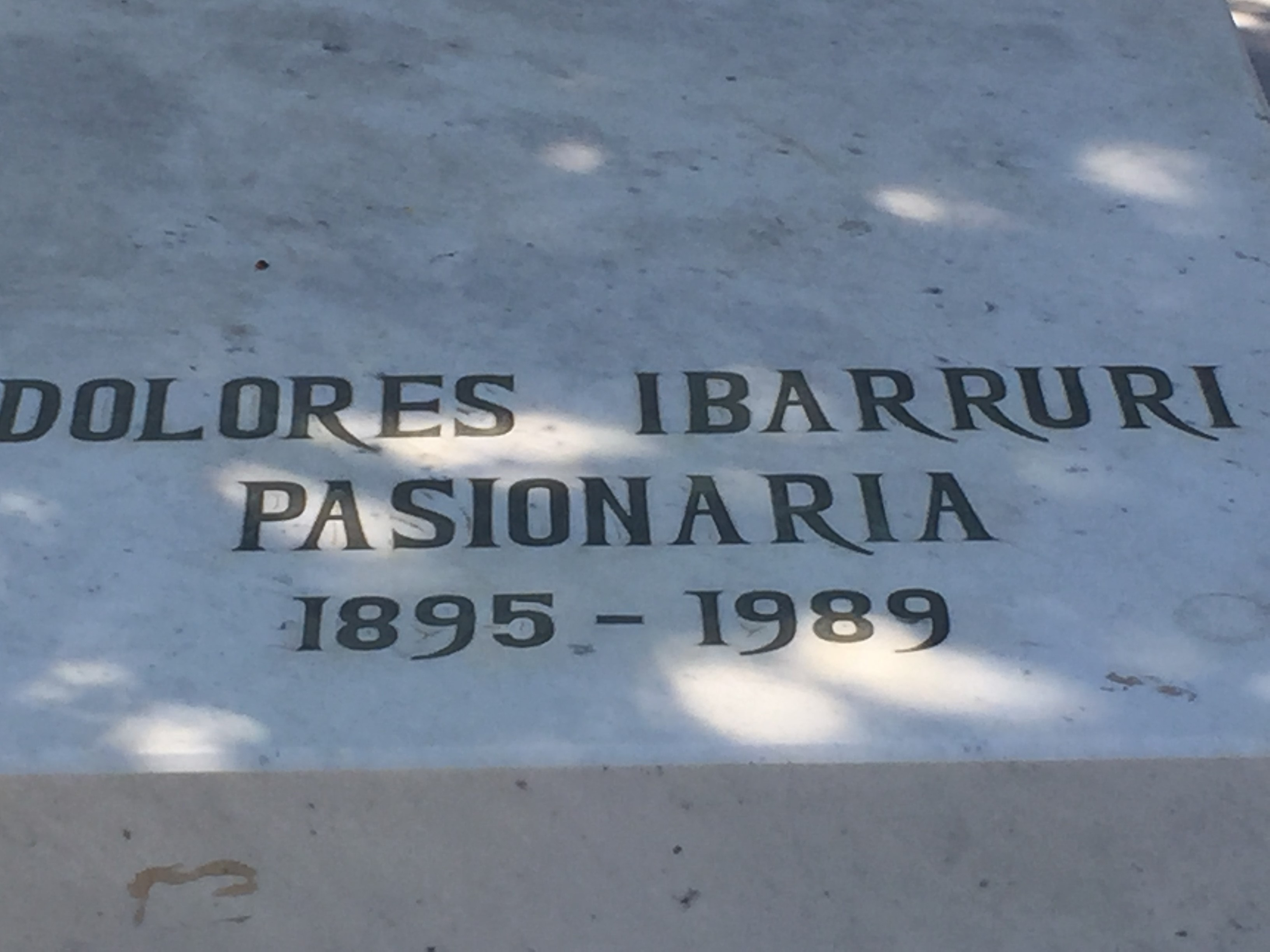 Mynwent La Almudena, Madrid